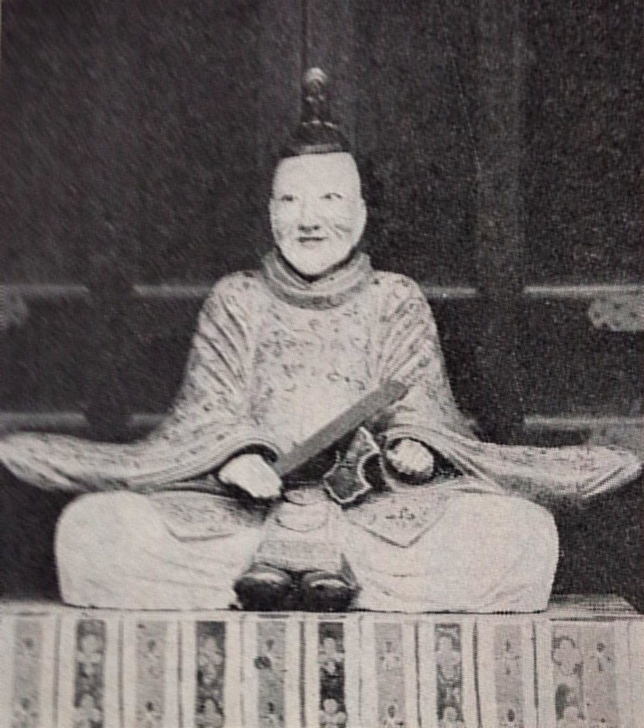 建部政長の陶像。